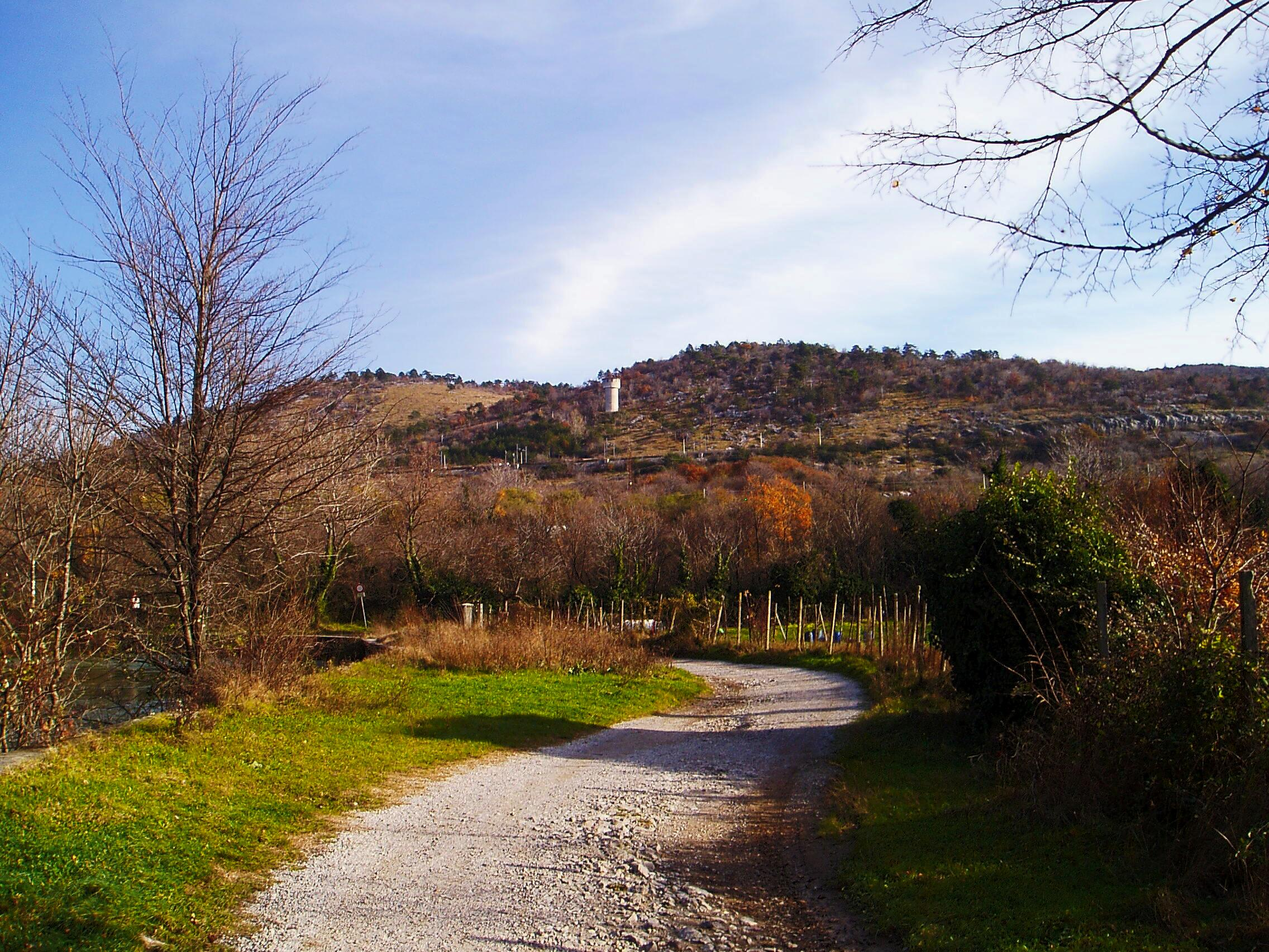 L'area di San Giovanni di Duino vista dalla foce del Timavo.